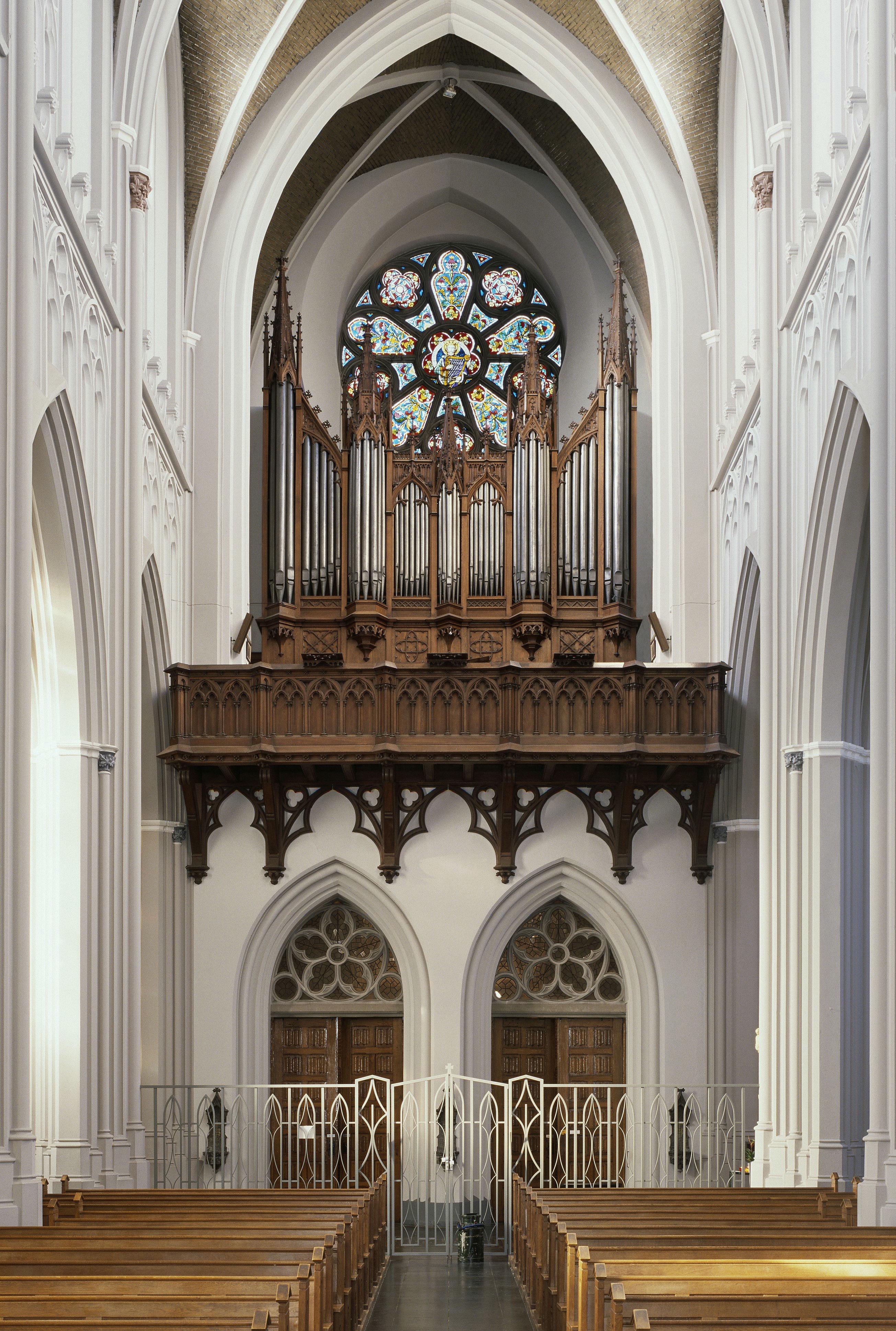 Sint Jozefkerk: Interieur, aanzicht orgel, orgelnummer 1465 (opmerking: Gefotografeerd voor Het Historische Orgel in Nederland 1886-1894, bladzijde 370)